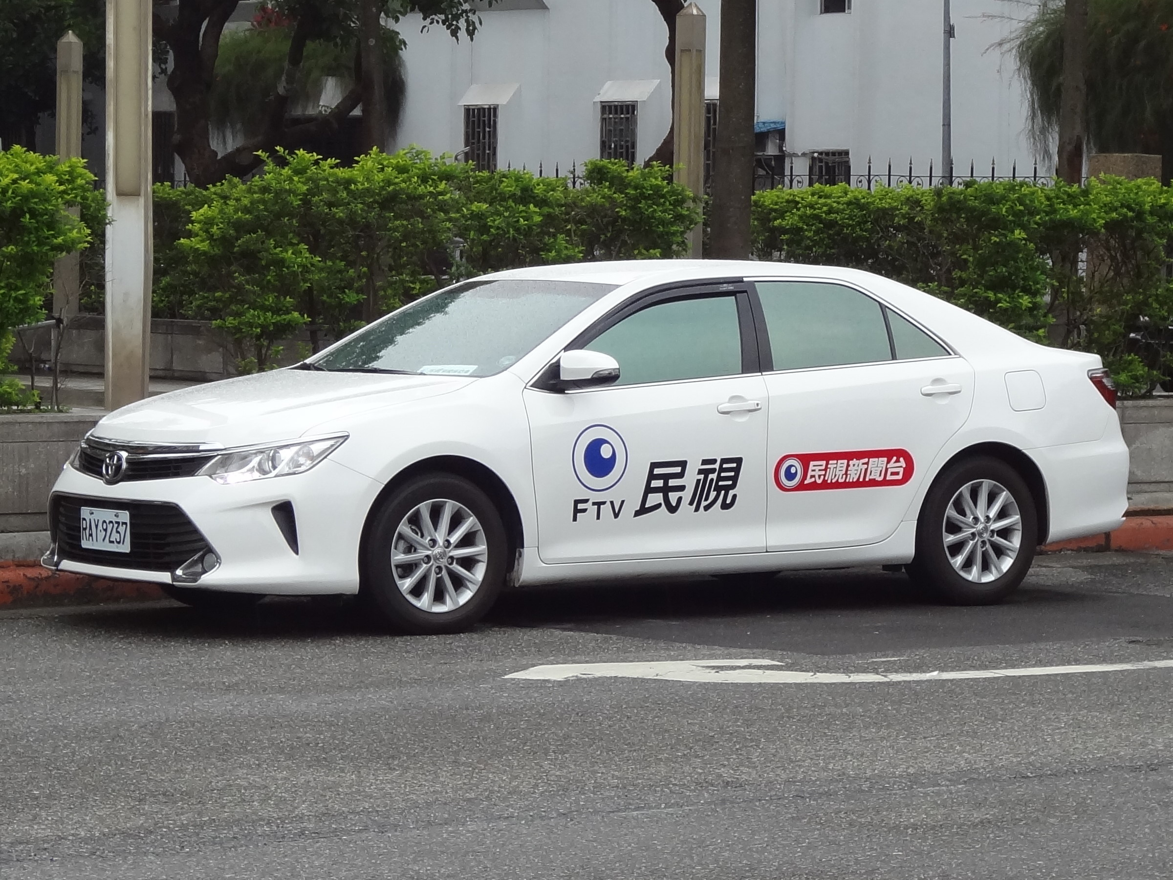 民視新聞豐田Camry 2.0採訪車RAY-9237。